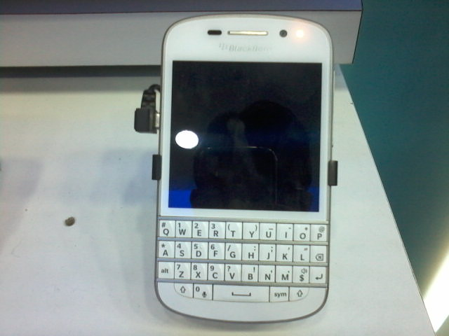 Blackbery Q10 foto tomada en un multicentro e Movistar Perú.